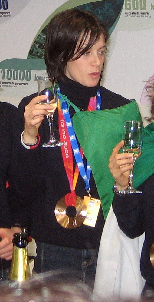 Mara Zini en février 2006